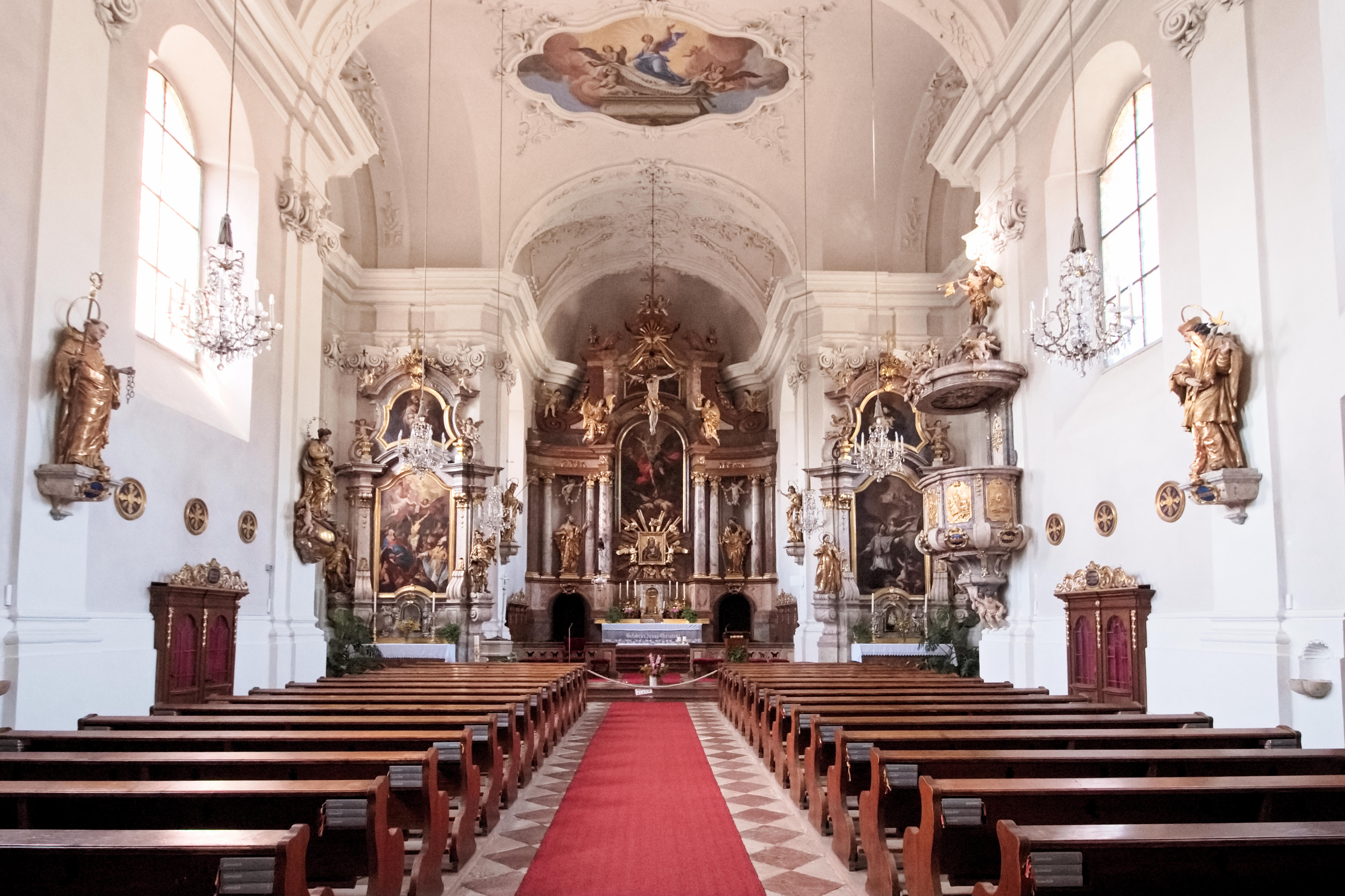 Innenansicht der Pfarrkirche Gnigl in der Stadt Salzburg